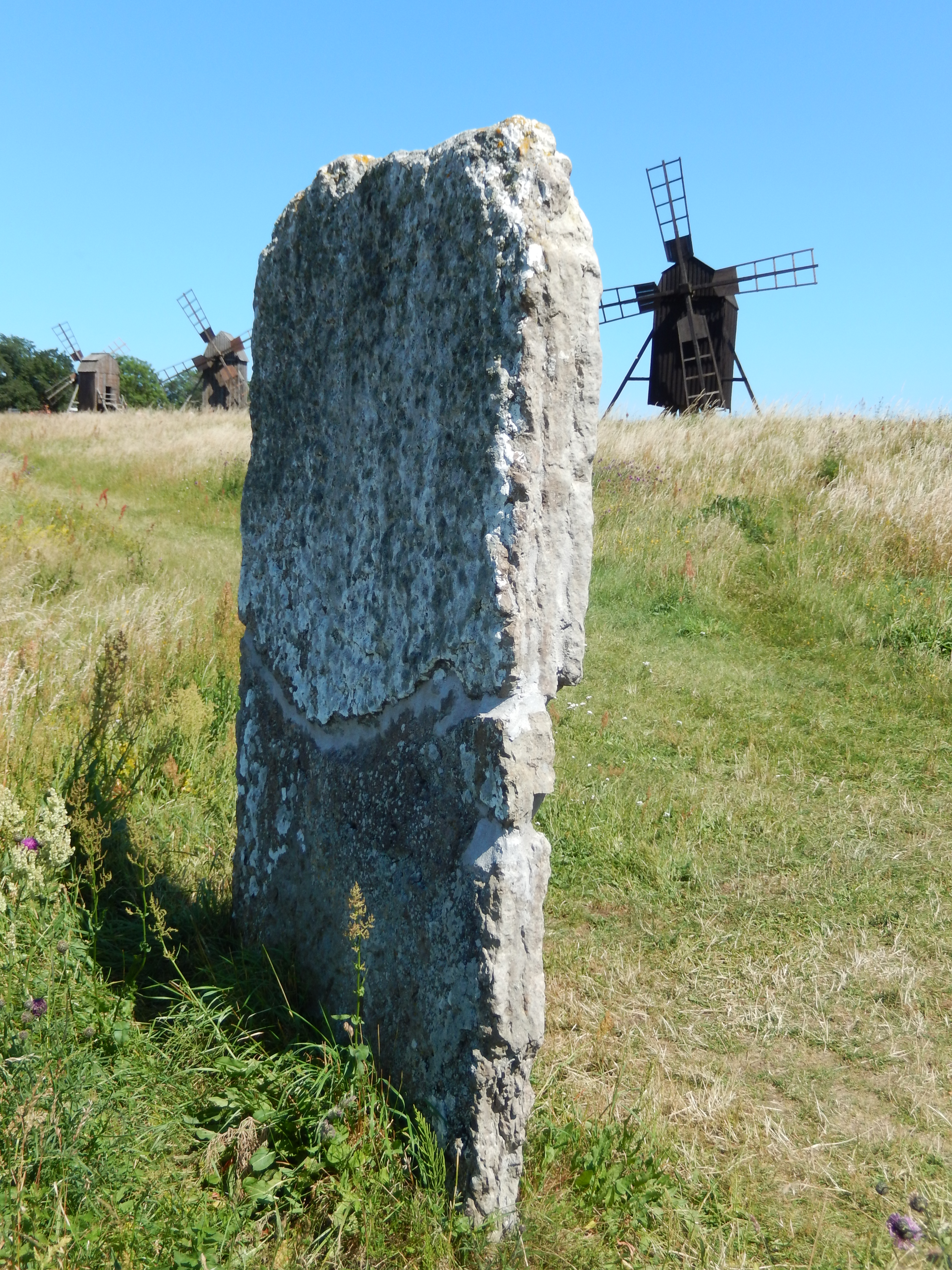 Runinskrift Öl 37. Lerkaka, Runstens socken på Öland.